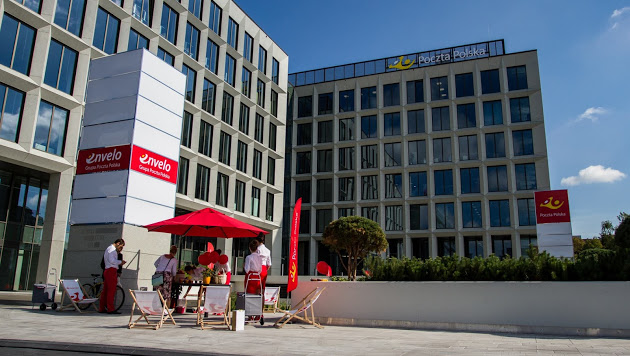 Envelo - Poczta Polska przez internet